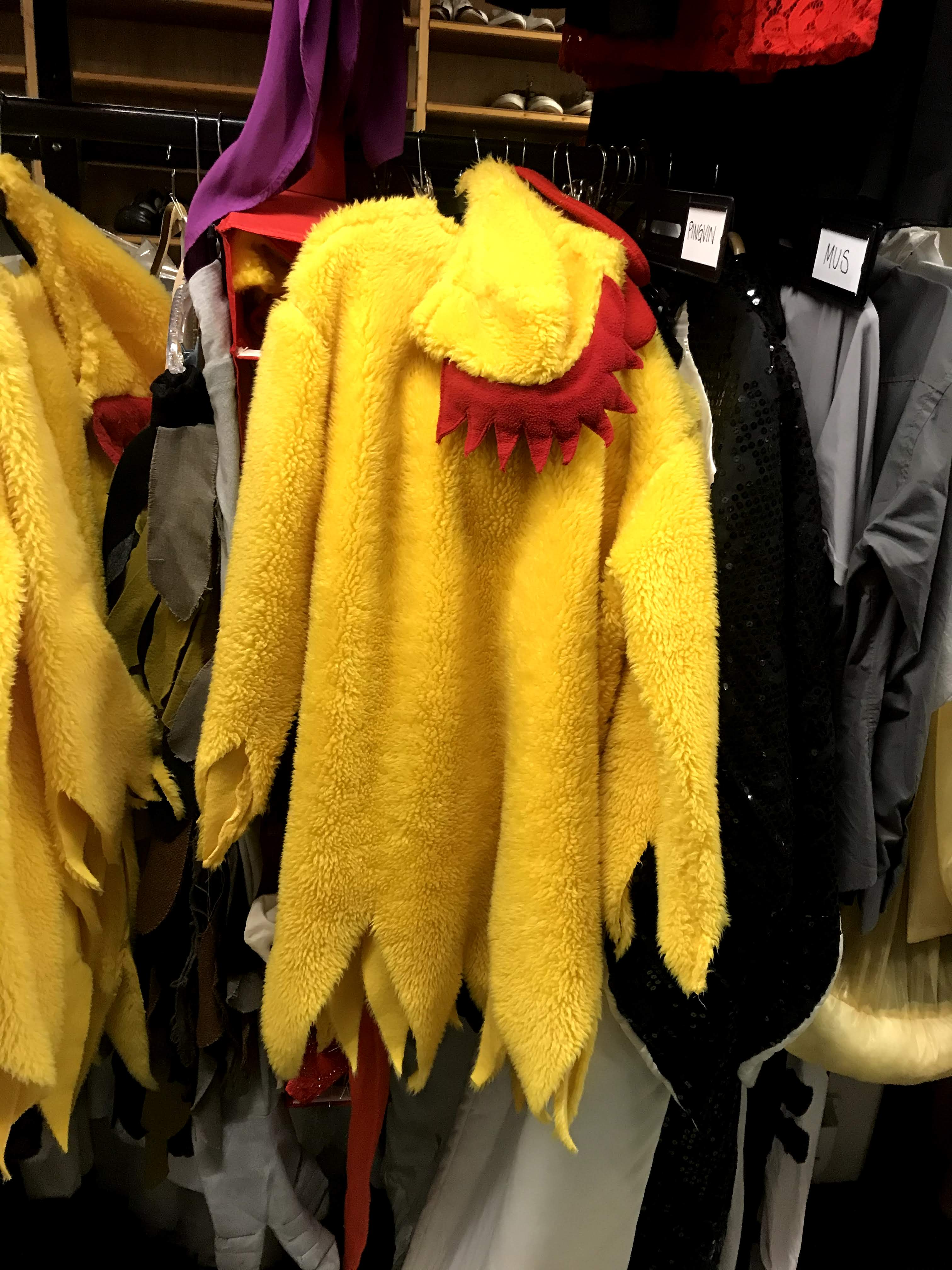 kyllingkostyme nrk kostyme